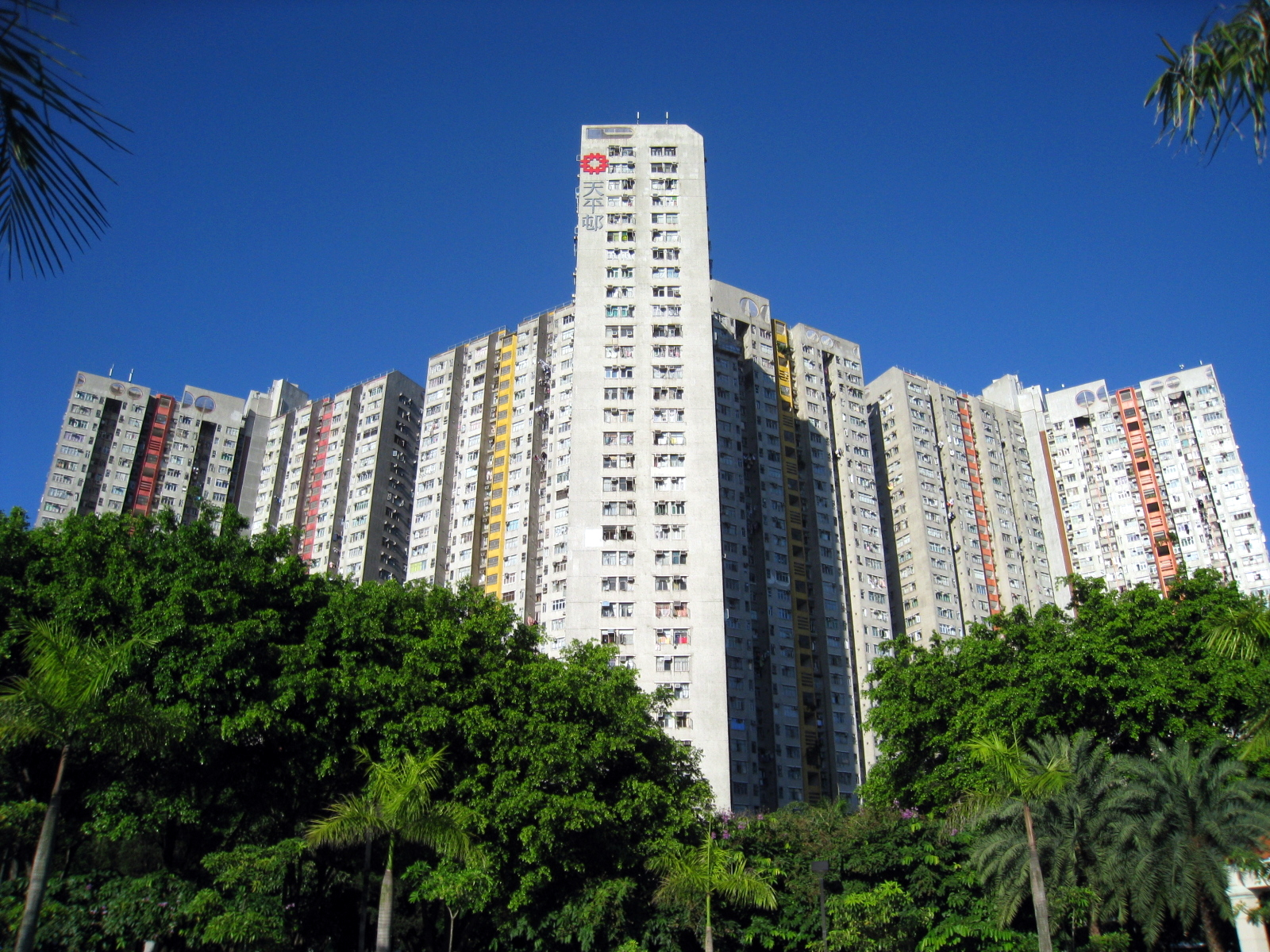 Tin Ping Estate Phase 1